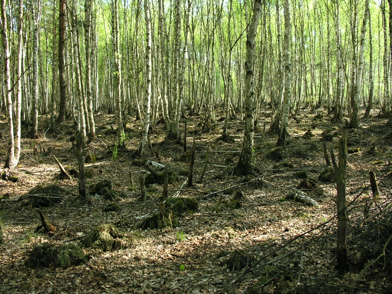 Rezerwat przyrody Bagno Jacka, Wesoła, Mazowieckie. This is a photography of Natura 2000 protected area with ID PLH140034